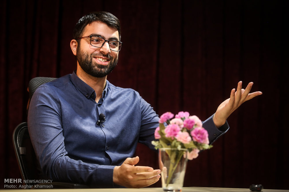 حسین شمقدری در نشست خبری مستند انقلاب جنسی۲